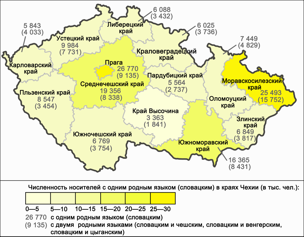 Численность носителей словацкого языка в краях Чешской Республики (с одним или двумя родными языками). По данным переписи 2011 года в Чехии: Český statistický úřad; Český statistický úřad. Sčítání lidu, domů a bytů 2011. Výsledky sčítání. Podle tématu. Definitivní výsledky. Obyvatelstvo. Mateřský jazyk; Český statistický úřad. Sčítání lidu, domů a bytů 2011. Tab. 614b Obyvatelstvo podle věku, mateřského jazyka a pohlaví (26.3.2011, аktualizováno: 26.10.2014).